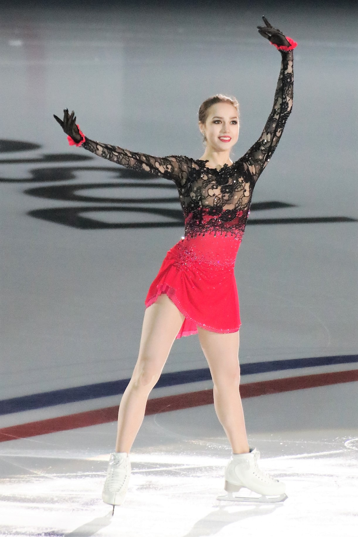 Алина Загитова (Россия) на Rostelecom Cup 2018